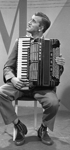 Harry Mooten in aflevering L, M van het AVRO-programma Van A tot Z